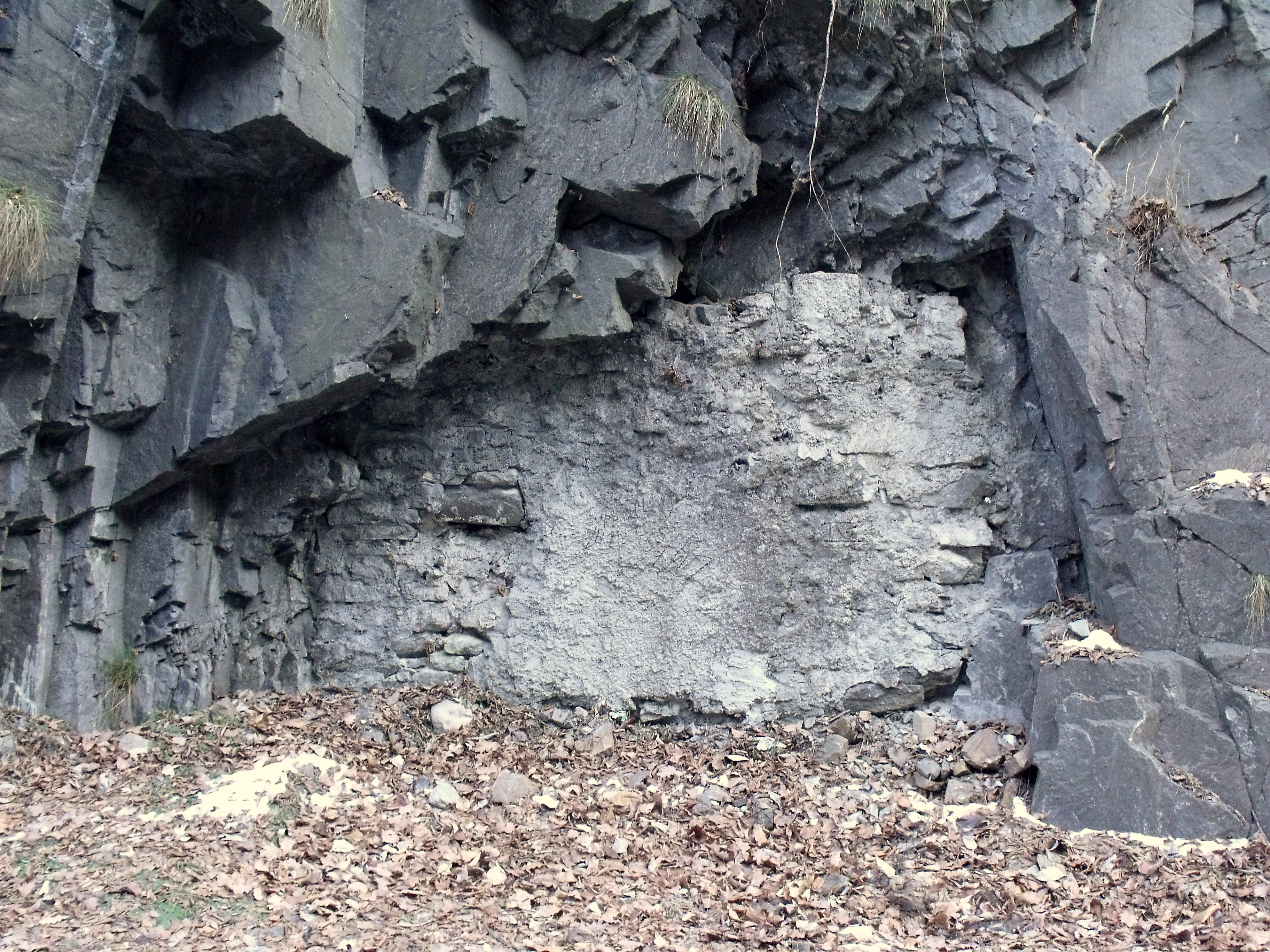 Opera 4 val d'Ega